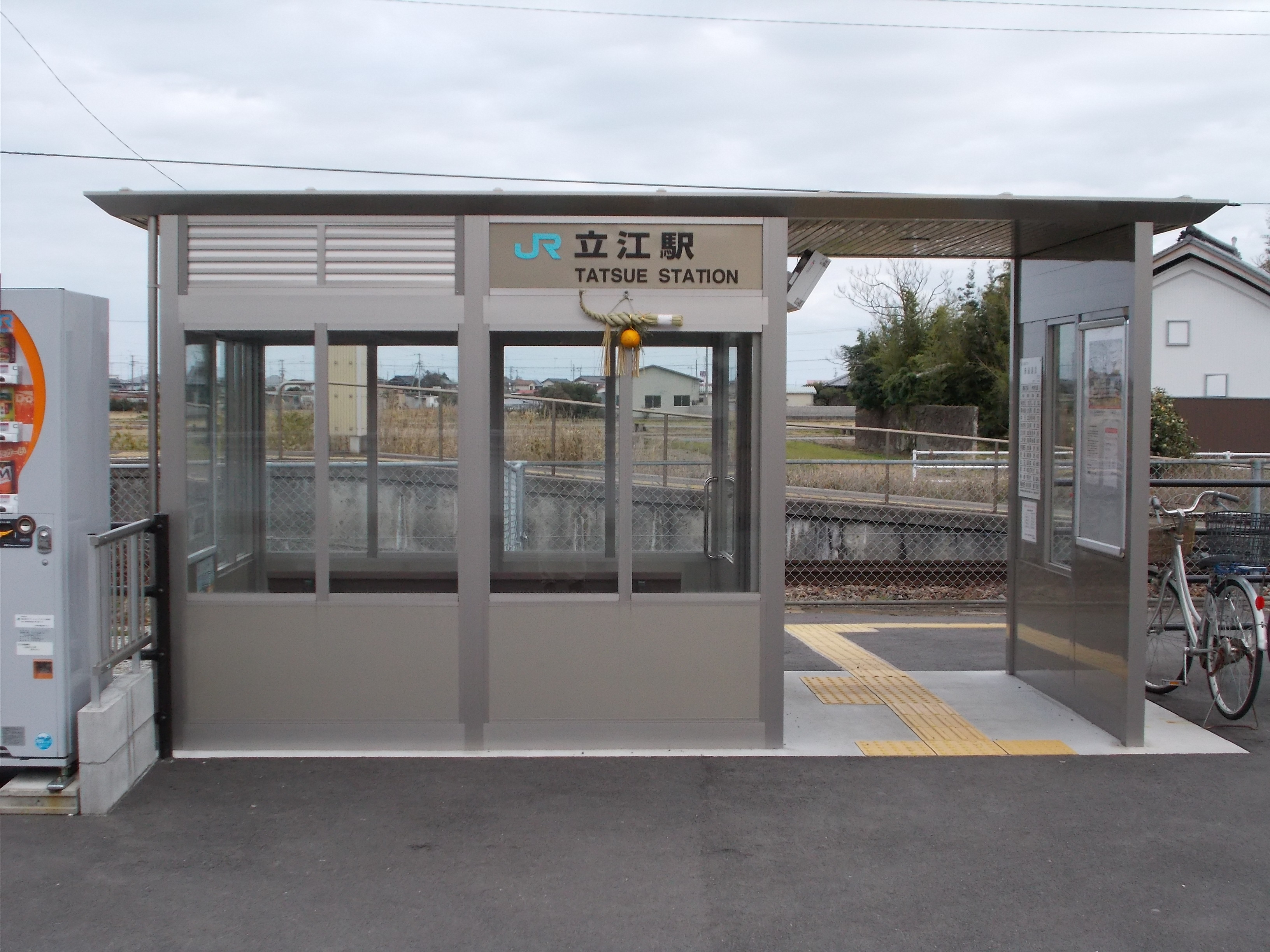 立江駅 駅舎